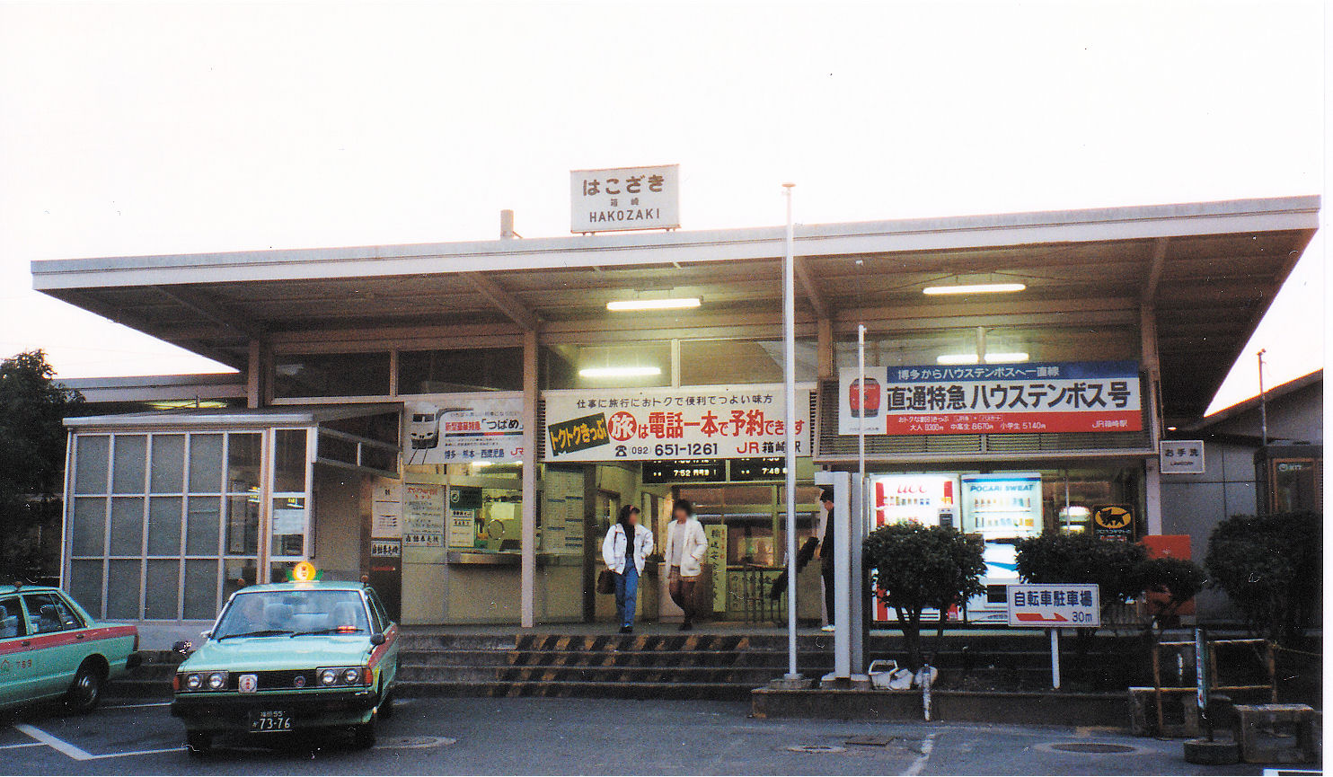 JR九州箱崎駅（高架化前）